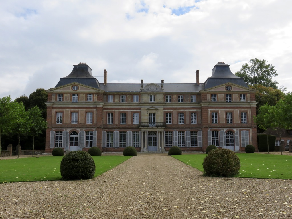 Façade avant du château datant du XVIII e siècle, partie centrale de la Restauration.